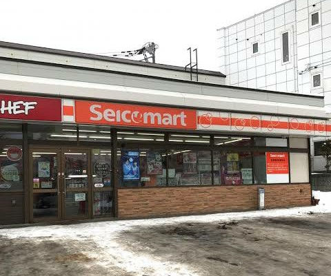 店舗例 セイコーマートいしづか